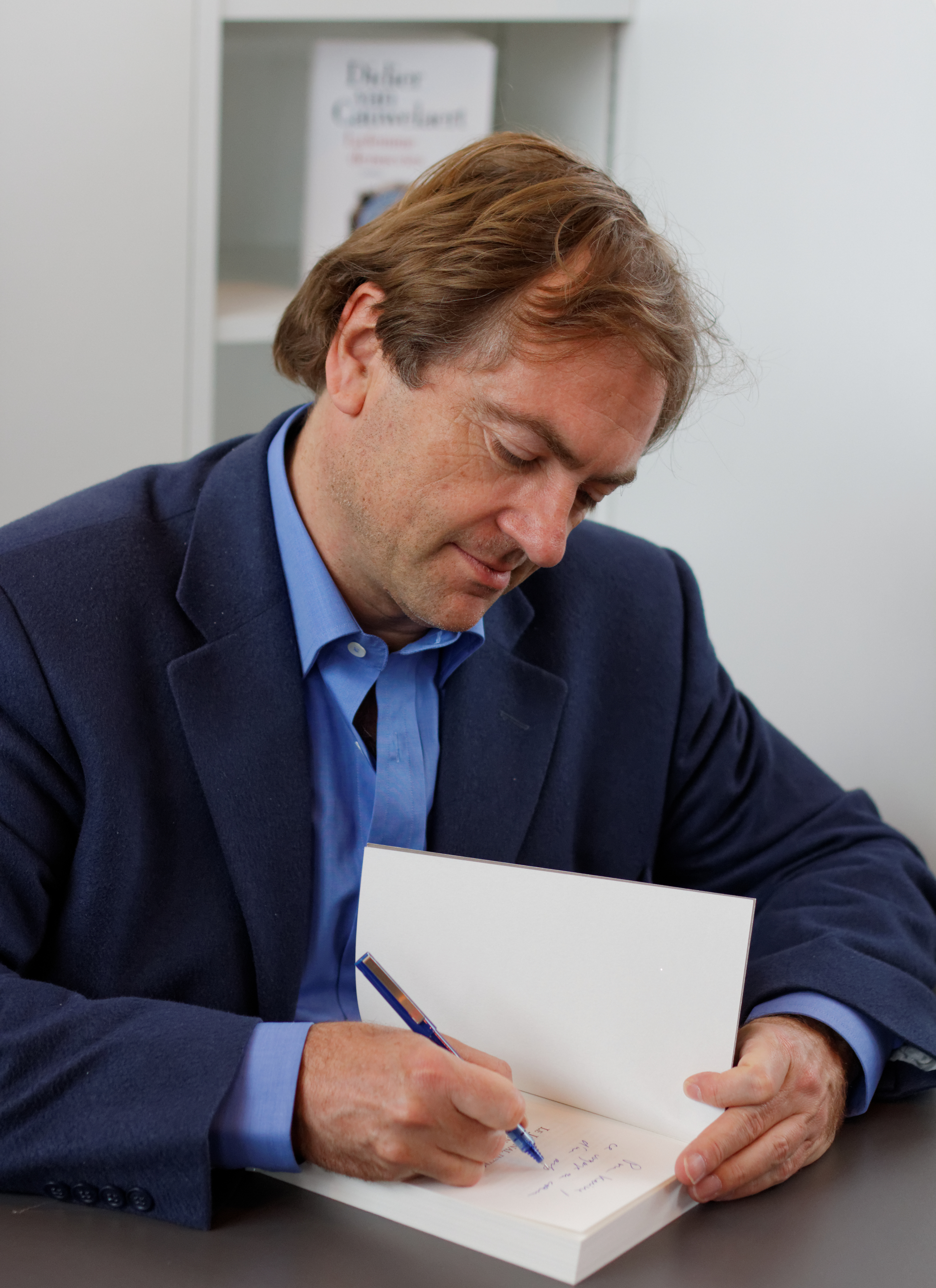 Didier Van Cauwelaert, salon du livre de Paris, 2013